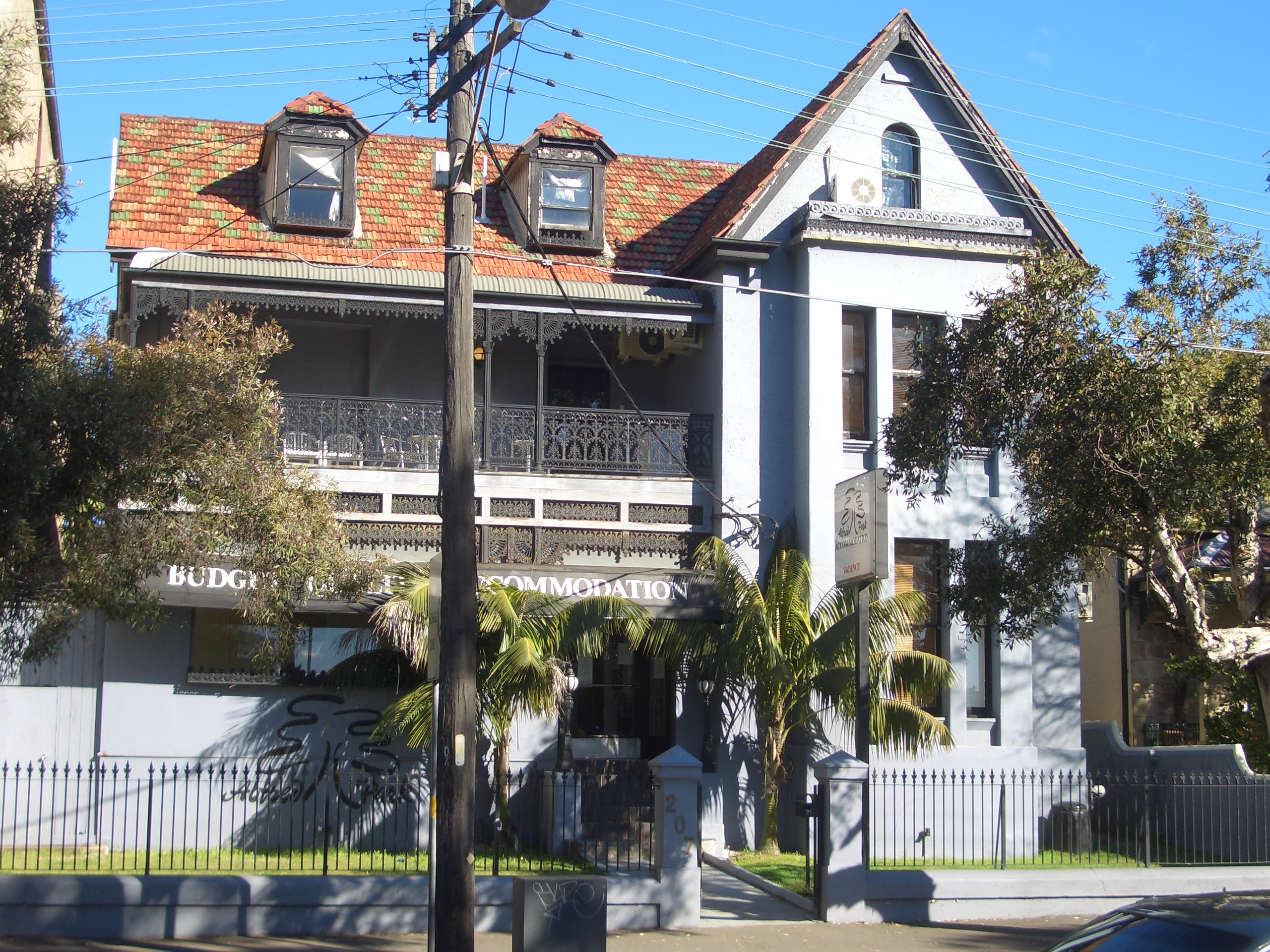 Cleveland Street, Redfern, Sydney